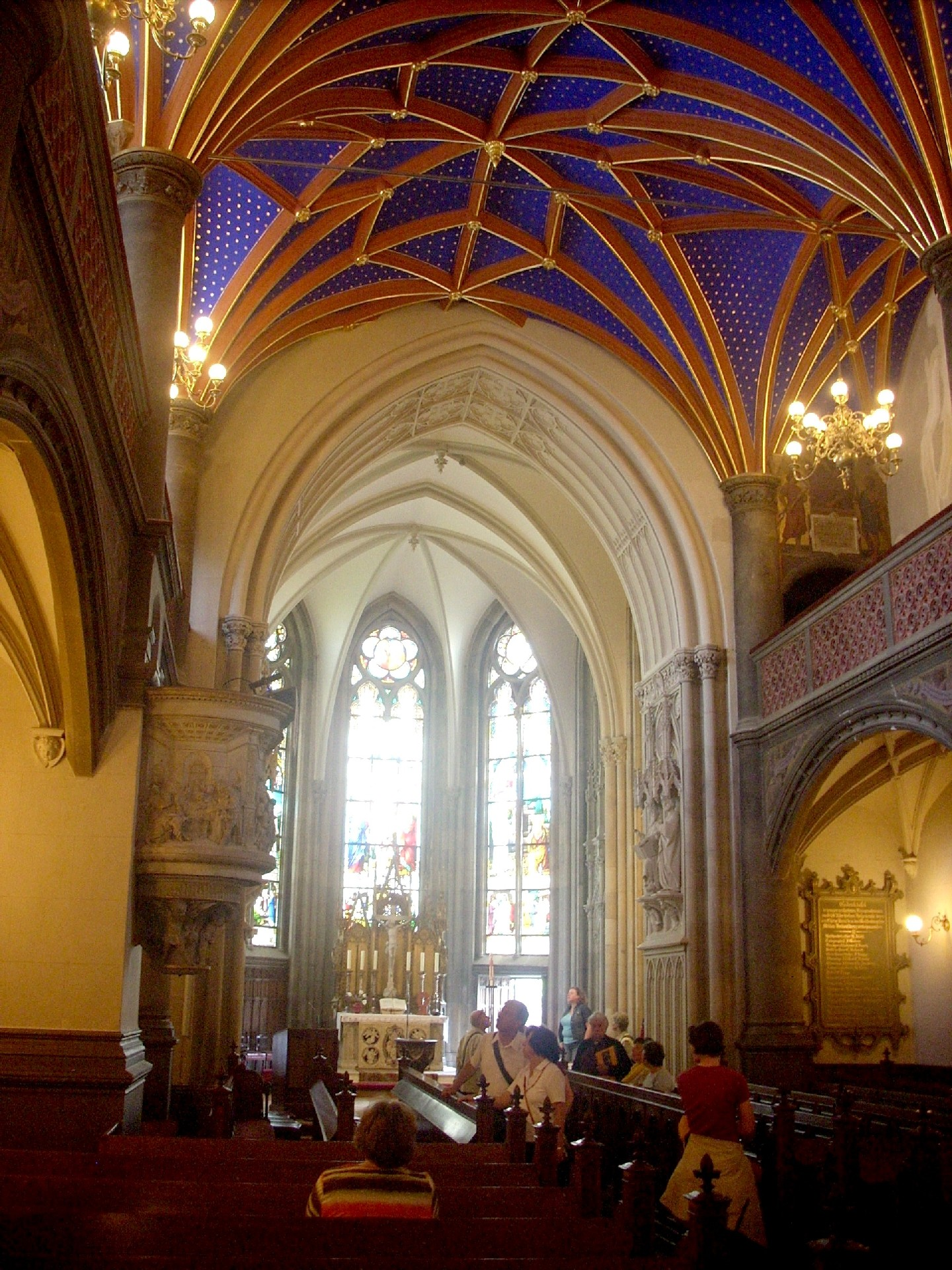 Schwerin, Schlosskirche, Inneres